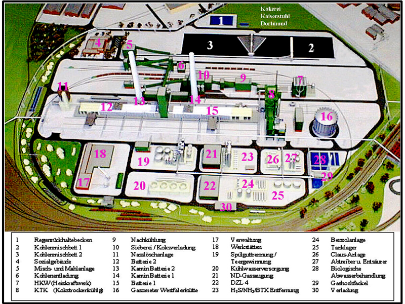 Modell der Kokerei Kaiserstuhl in Dortmund mit Legende